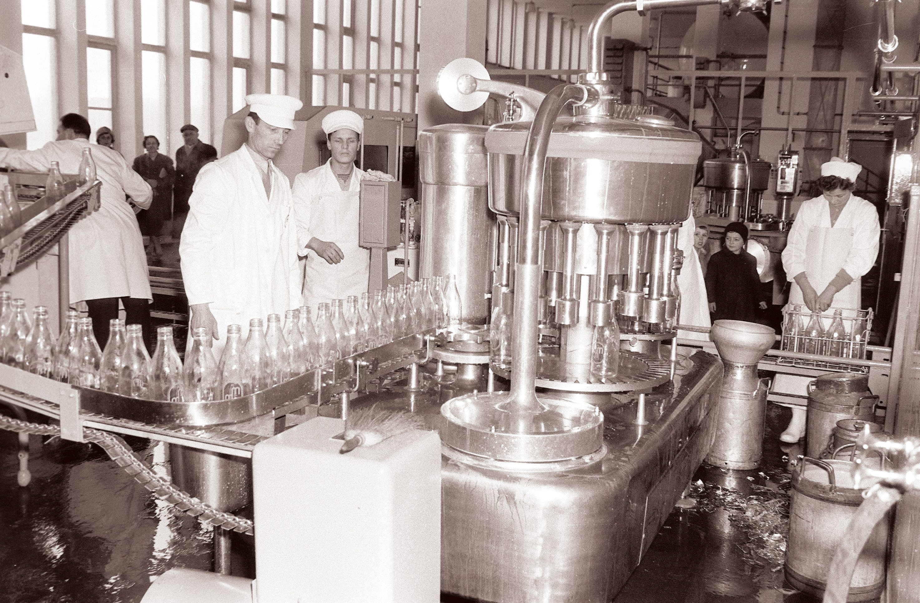 Novi prostori Mariborske mlekarne na Obrežju